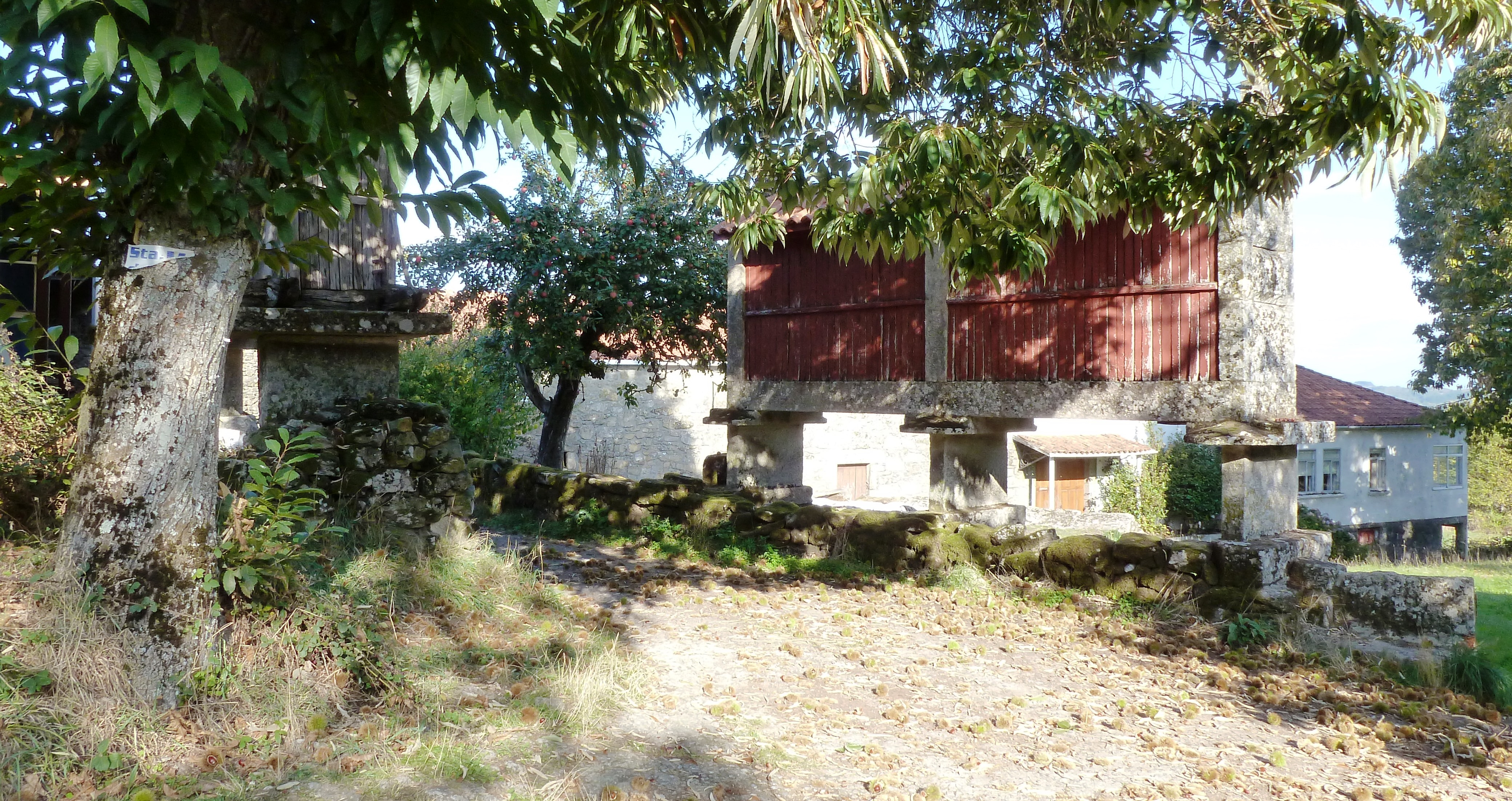 Entrada ao lugar de Esmolfe, Santa Cristina, Carballedo